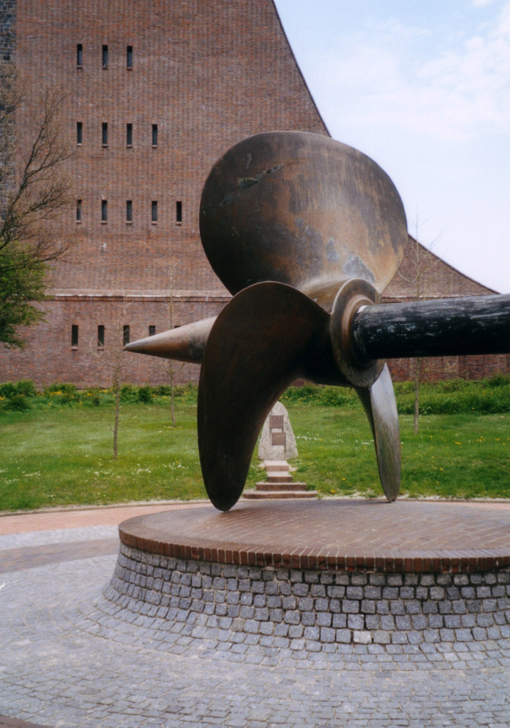 Marineehrenmal Laboe / Im Vordergrund die Backbord Schraube von Prinz Eugen